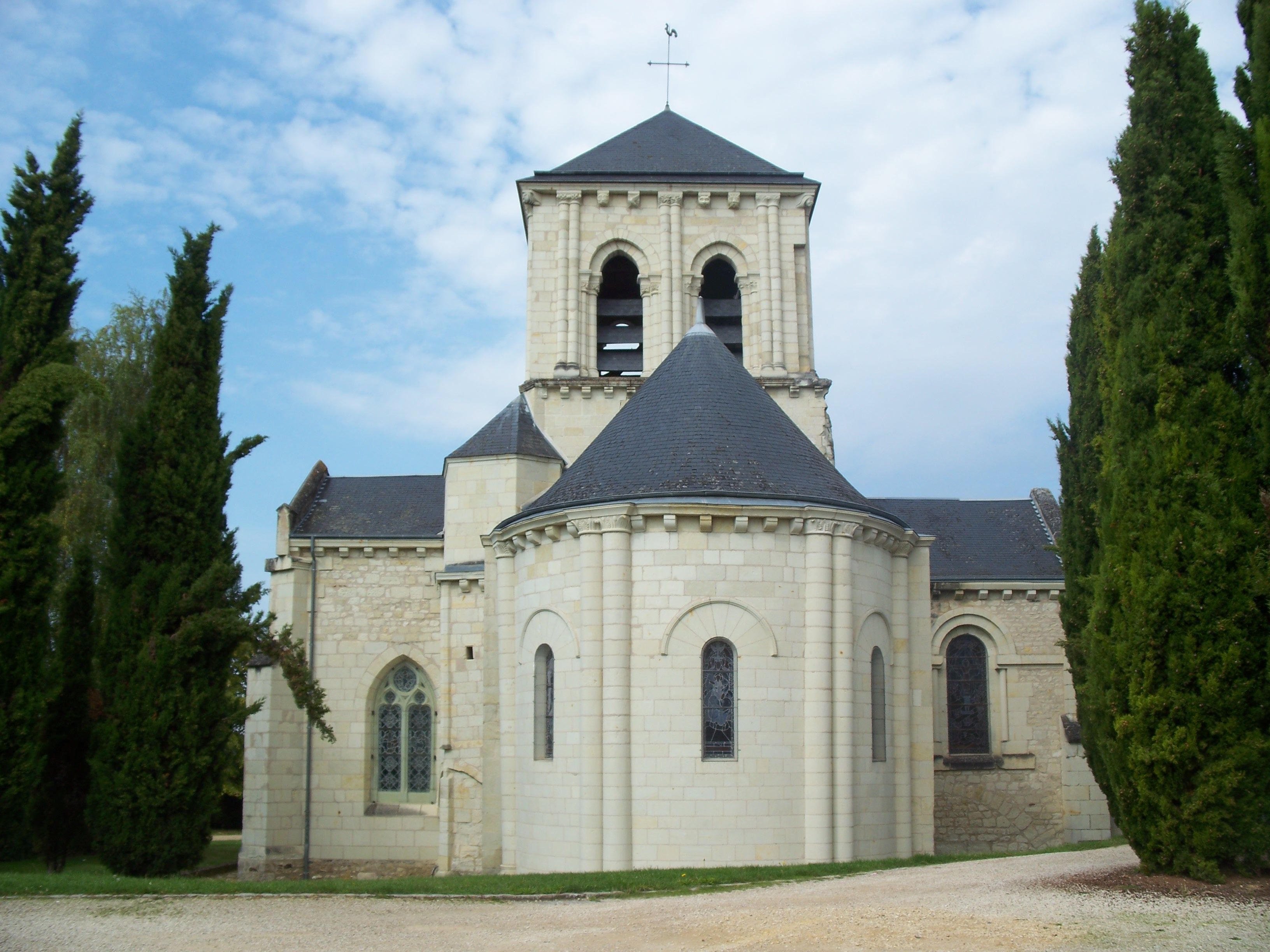 Église Notre-Dame de Beaumont (Inscrit) .